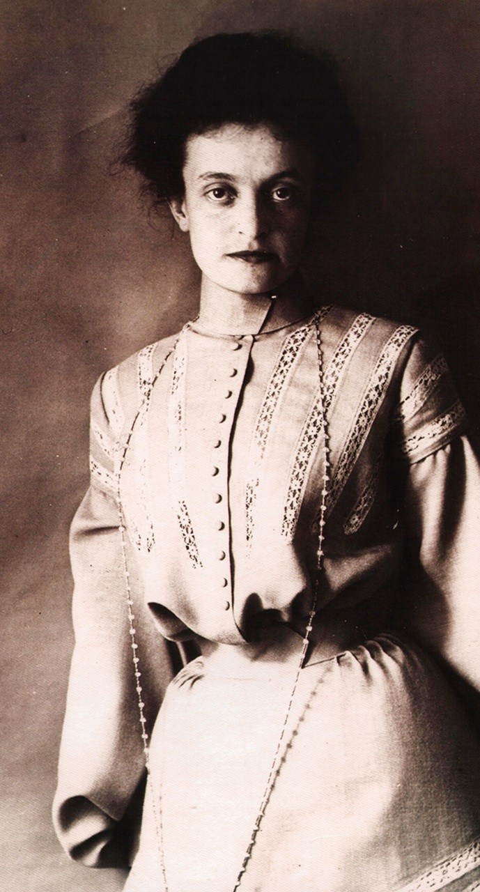 Олена Кульчицька — український графік, маляр, педагог.